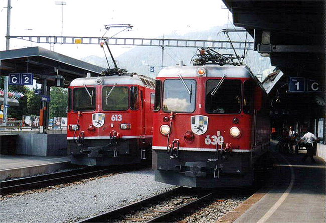 Zwei Lokomotiven der Rhätischen Bahn, Baureihe RhB Ge 4/4 II im Bahnhof von Klosters. Rechts Lokomotive 630 (Trun) im Zustand vor der bei diesen Maschinen durchgeführten Runderneuerung, links dahinter die bereits umgebaute Ge 4/4 II 613 (Domat/Ems) mit den eckigen Scheinwerfern und einer veränderten Position der Fahrzeugnummer an der Stirnseite.